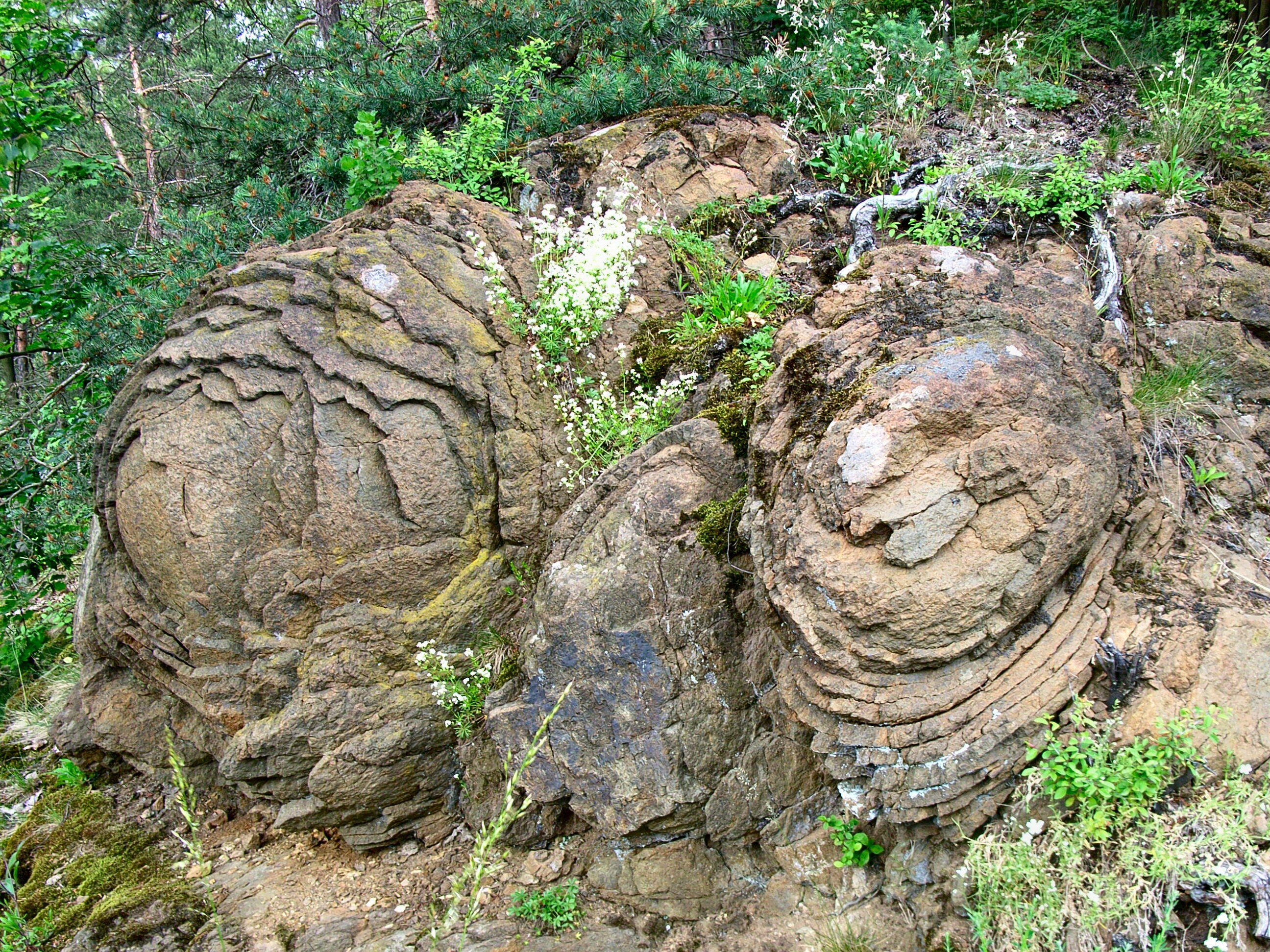 Die „Steinerne Rose“ bei Saalburg in Thüringen – eine geologische Seltenheit